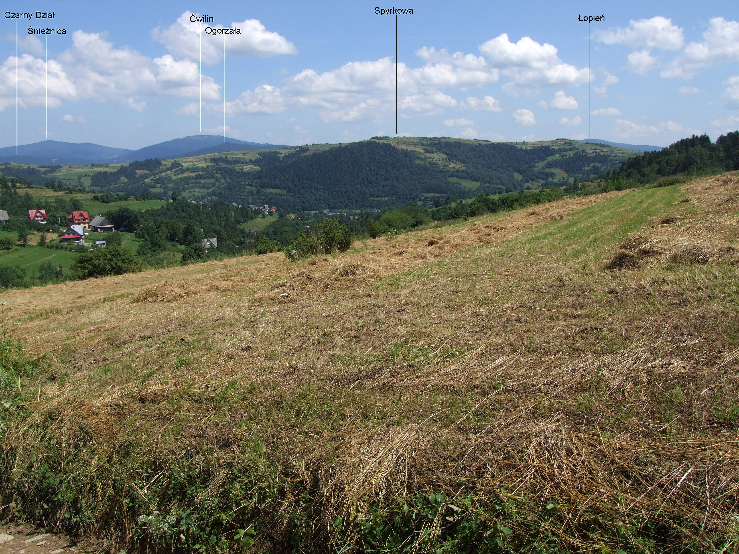 Widok z Potaczkowej